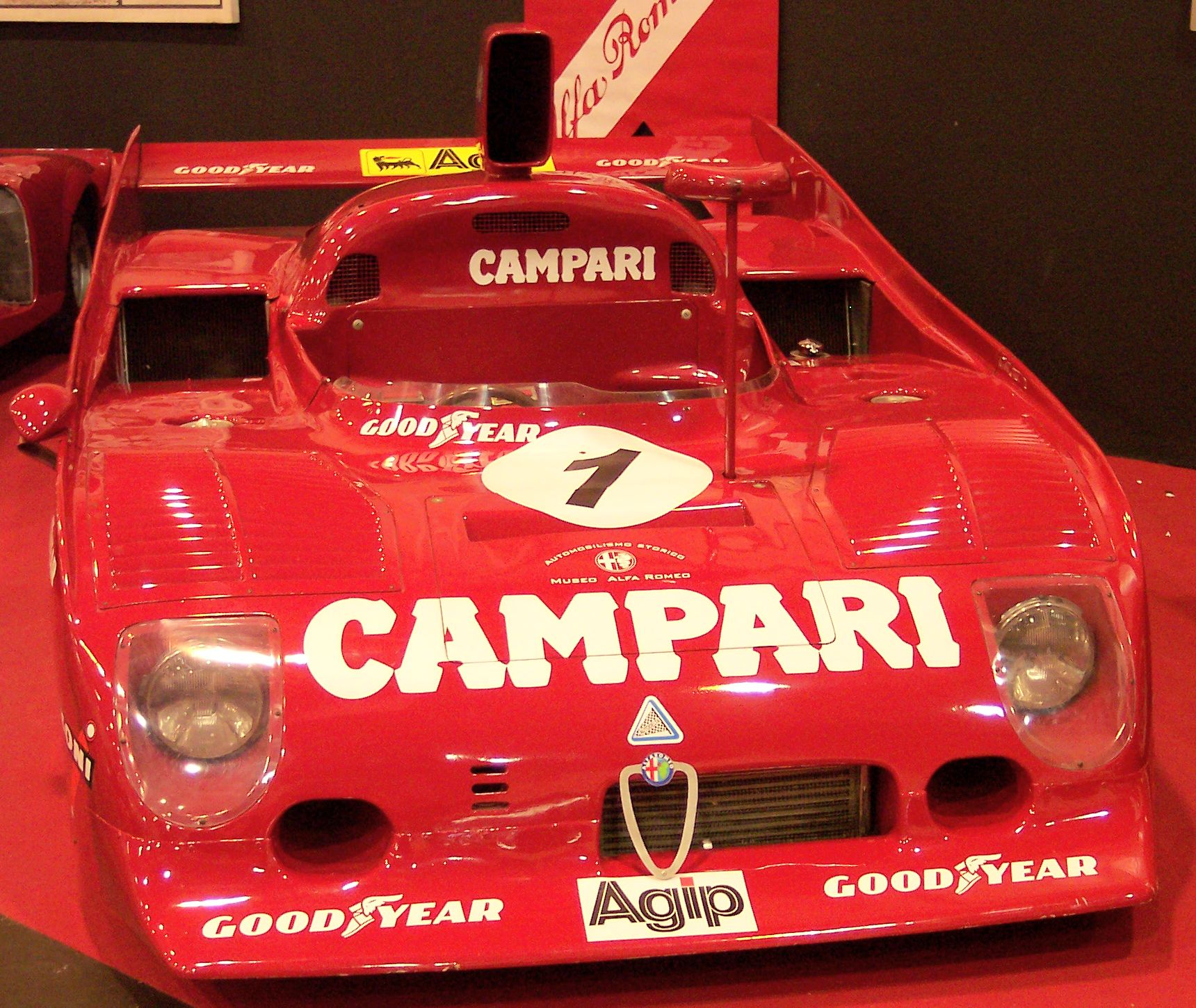 Alfa Romeo 33 TT 12 1975